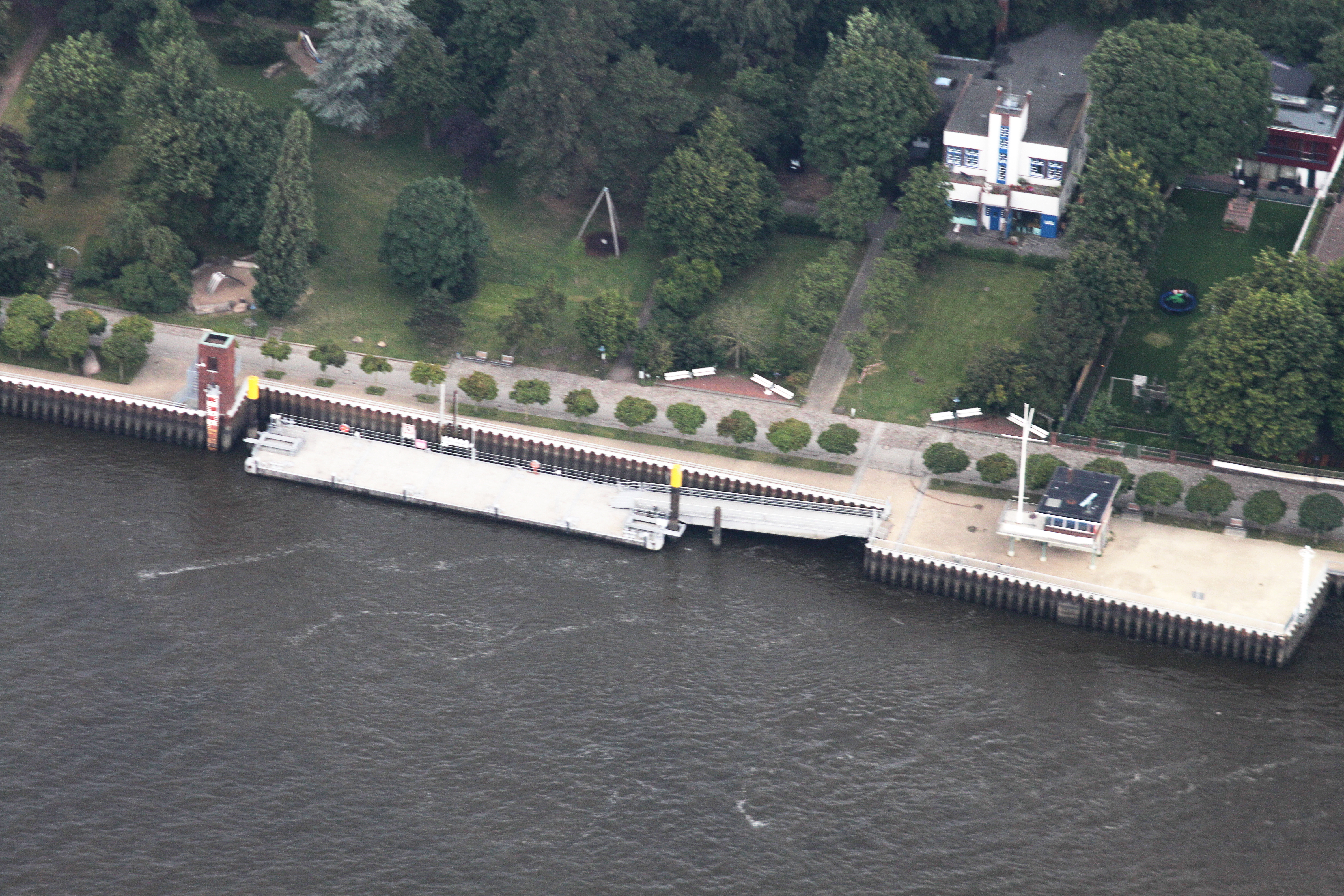 Fotoflug Bremen; Flughöhe 500 m; Luftbilder Bremen-Nord: vom U-Boot Bunker Valentin bis Vegesack ; Flug entlang der Weser von West nach Ost, über dem linken Weserufer, mit Blickrichtung zum rechten Weserufer